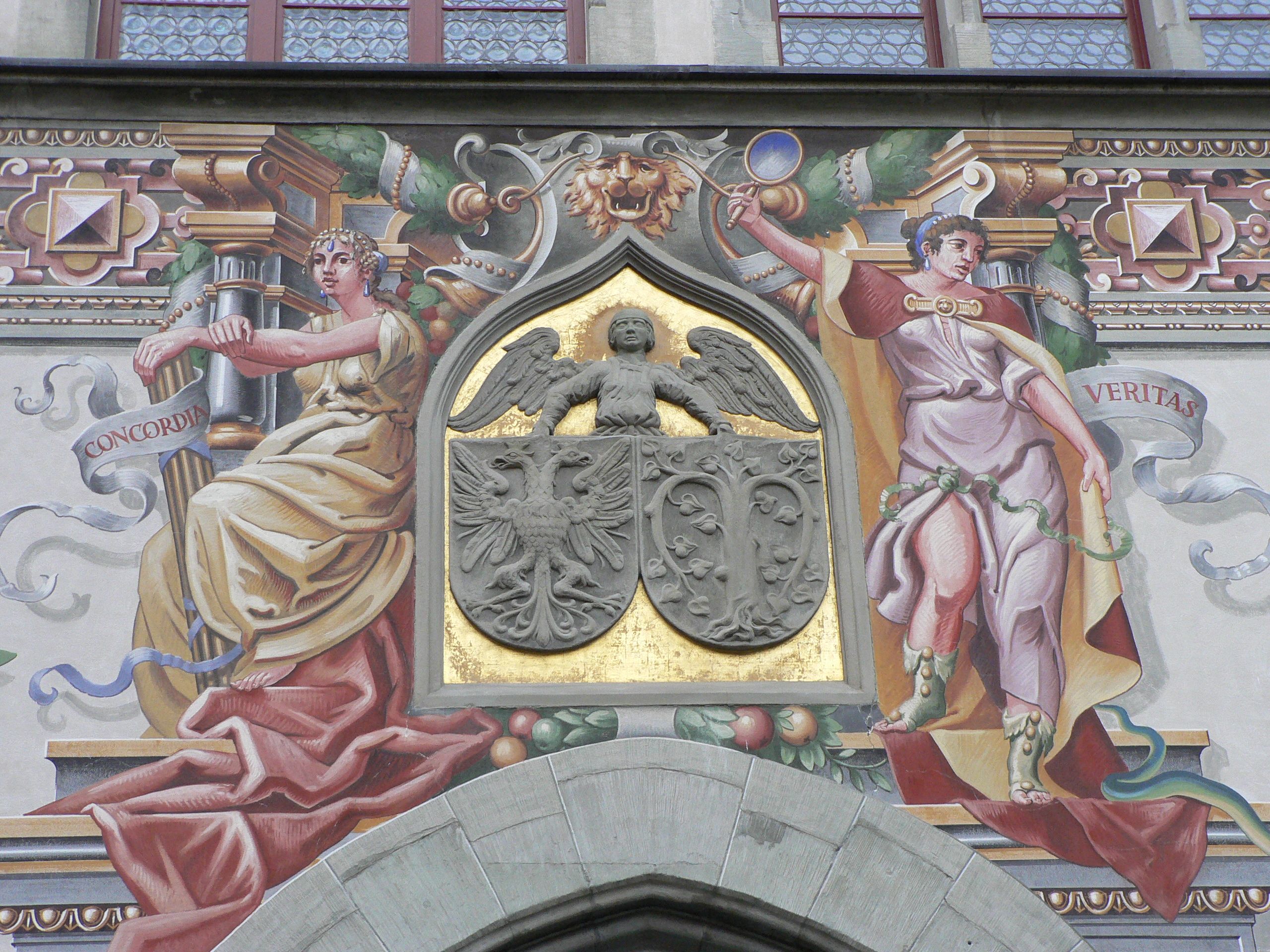 Malerei über dem Rathausportal von Lindau